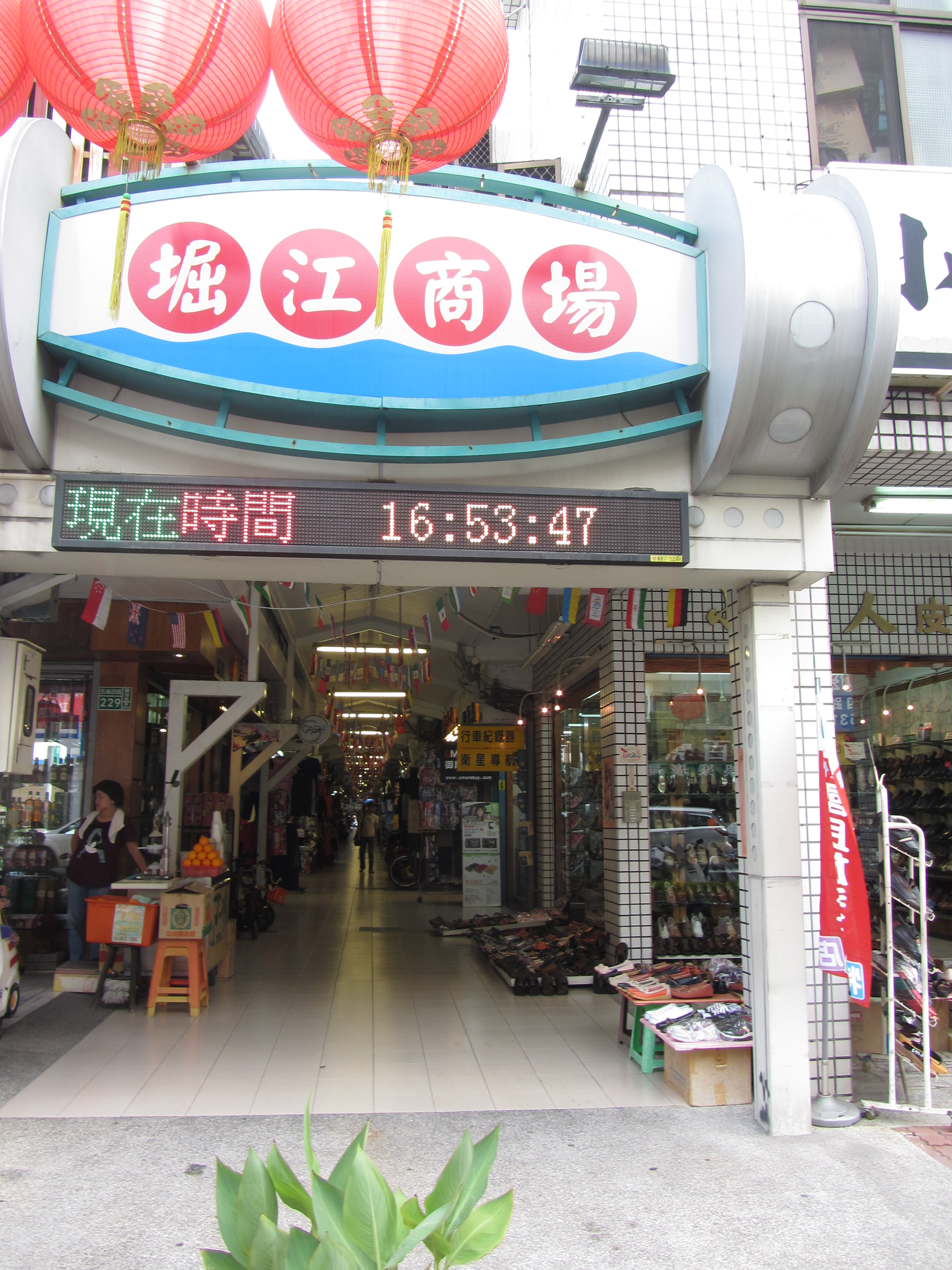 高雄市鹽埕區堀江商場五福四路入口